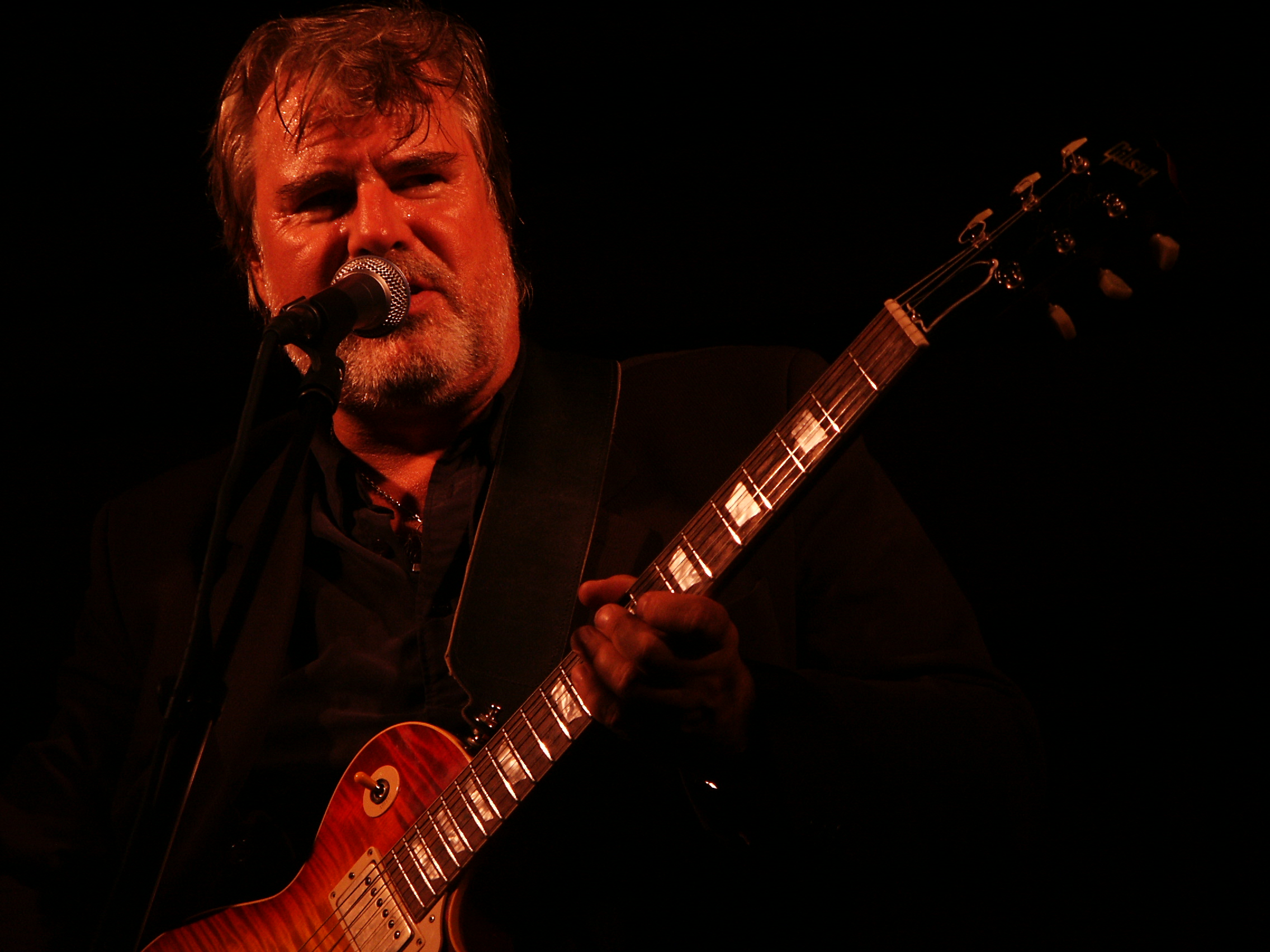 Roffe Wikström på Jazzfestivalen 2004- Efter en trött första halvtimme slänger Roffe spellistan och börjar ha roligt. Så roligt att jag glömde bort att ta fler bilder efter denna...